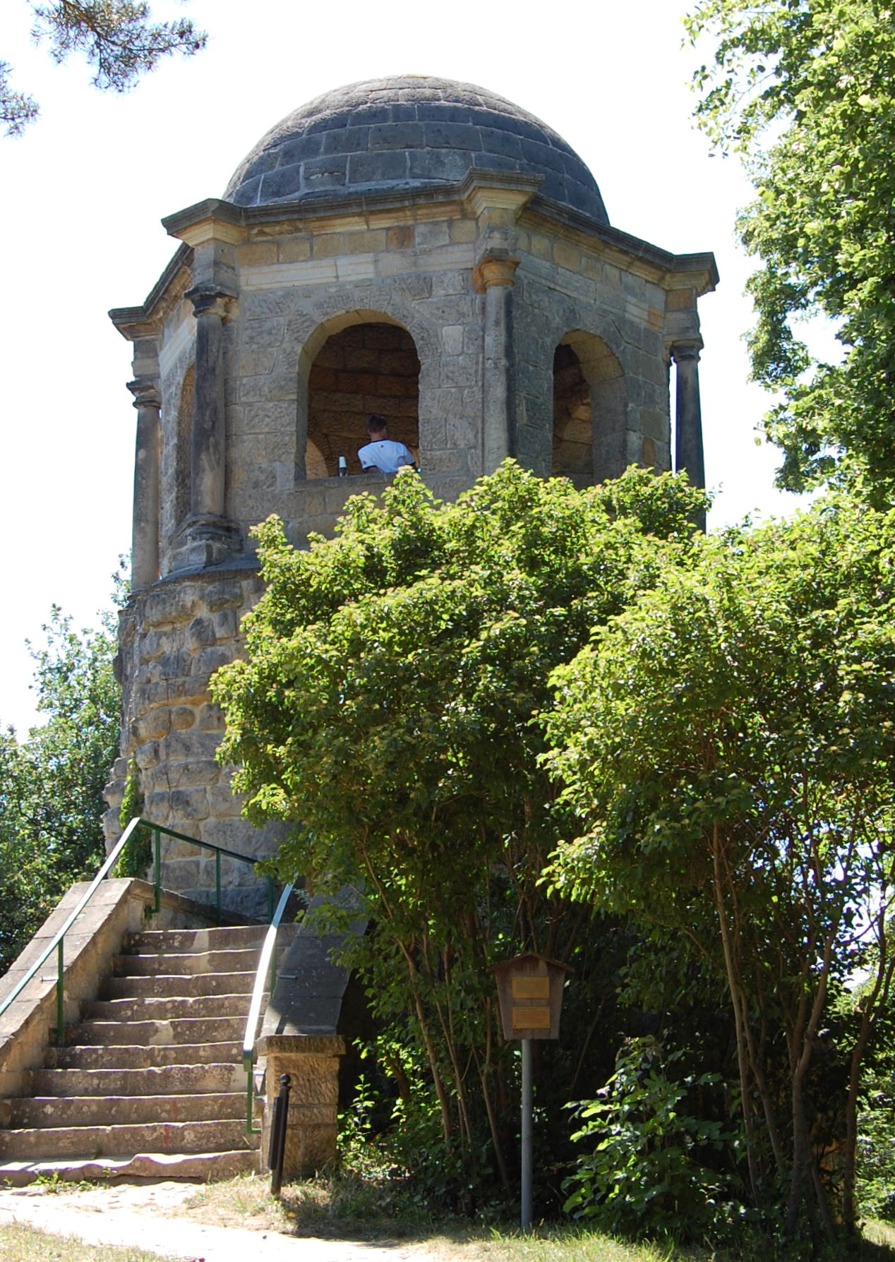 Turm Belvedere Spiegelsberge Halberstadt